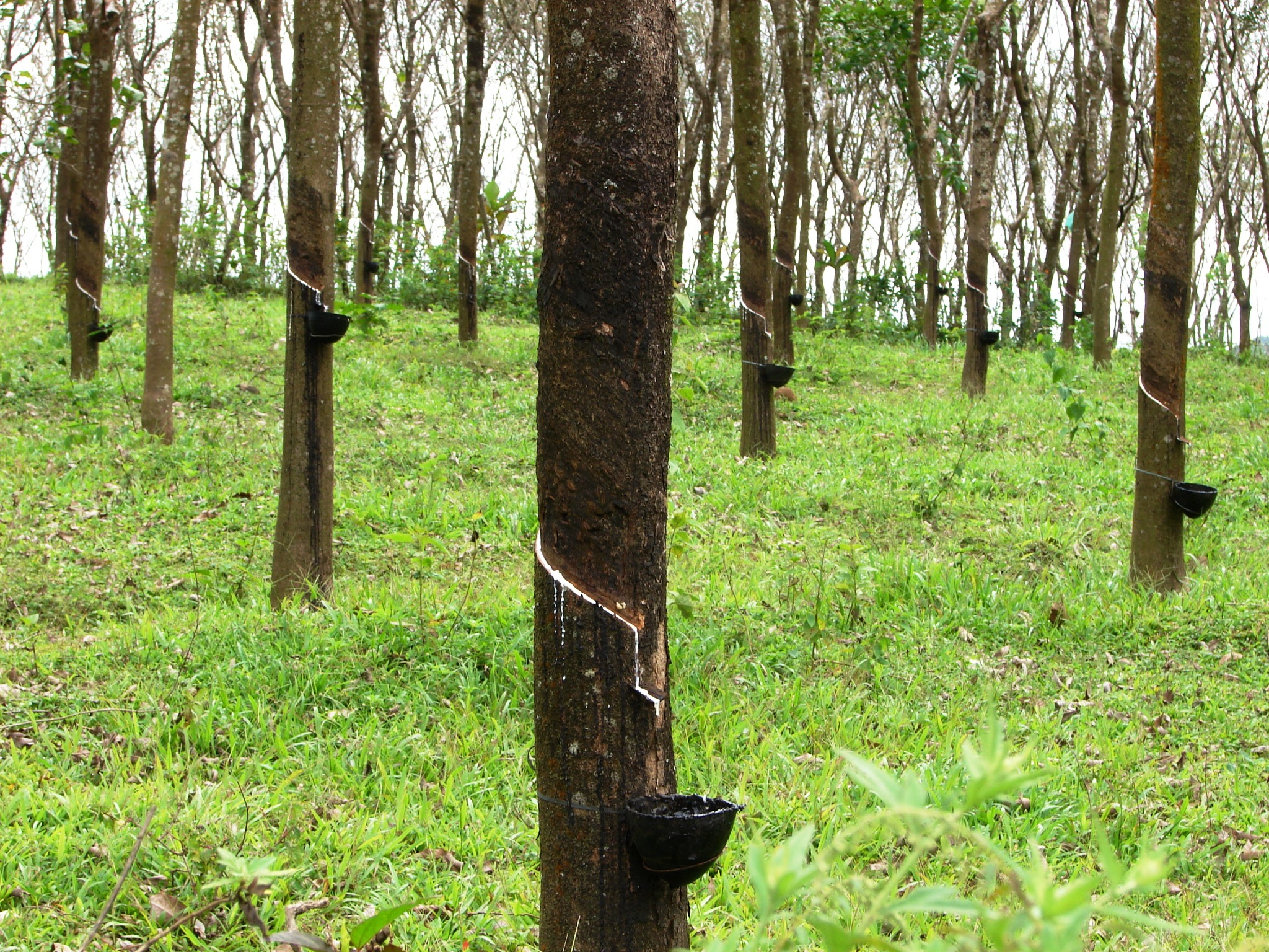 Rubber trees in Kerala, India